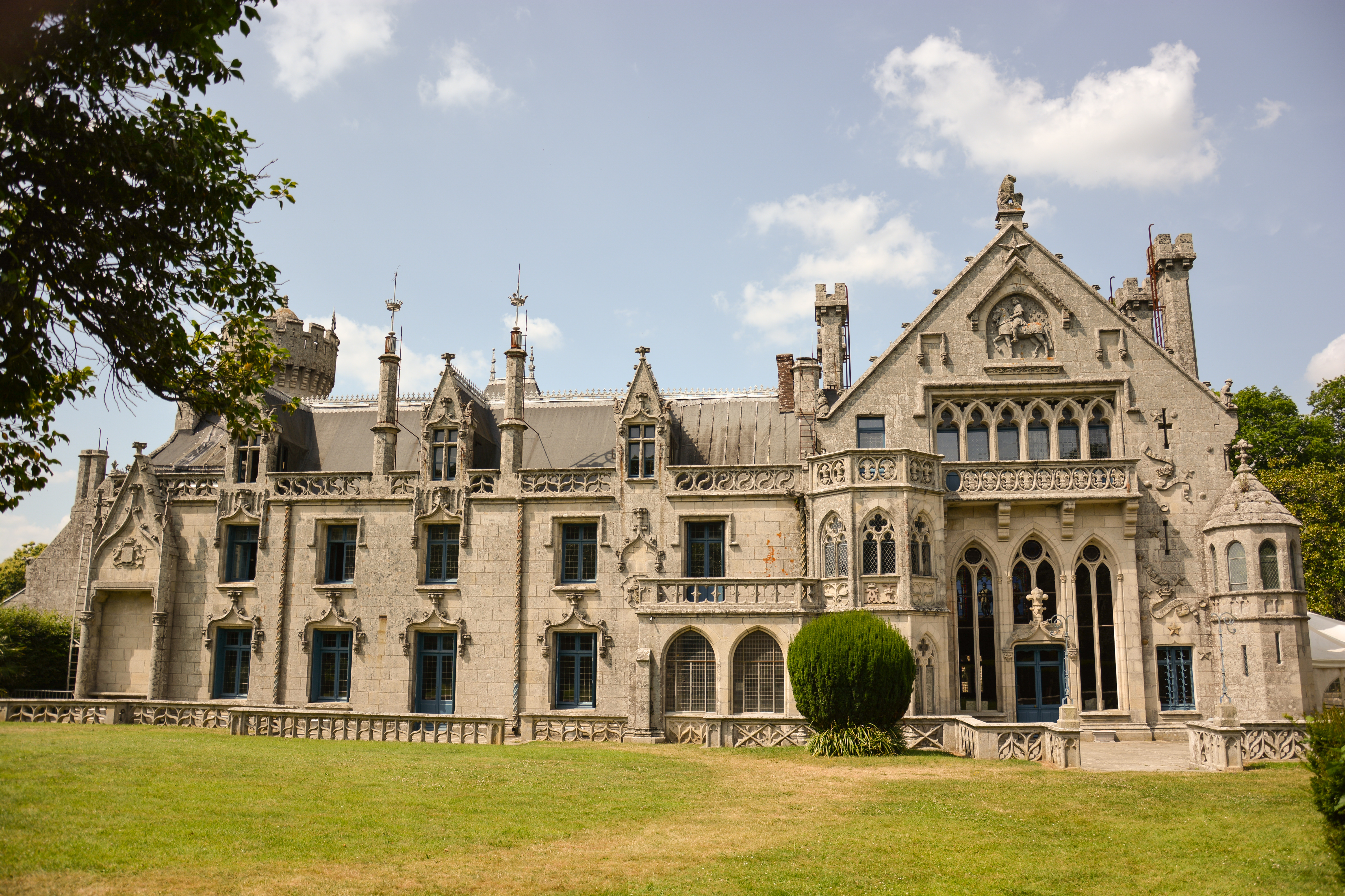 Château de Kériolet (Inscrit) .